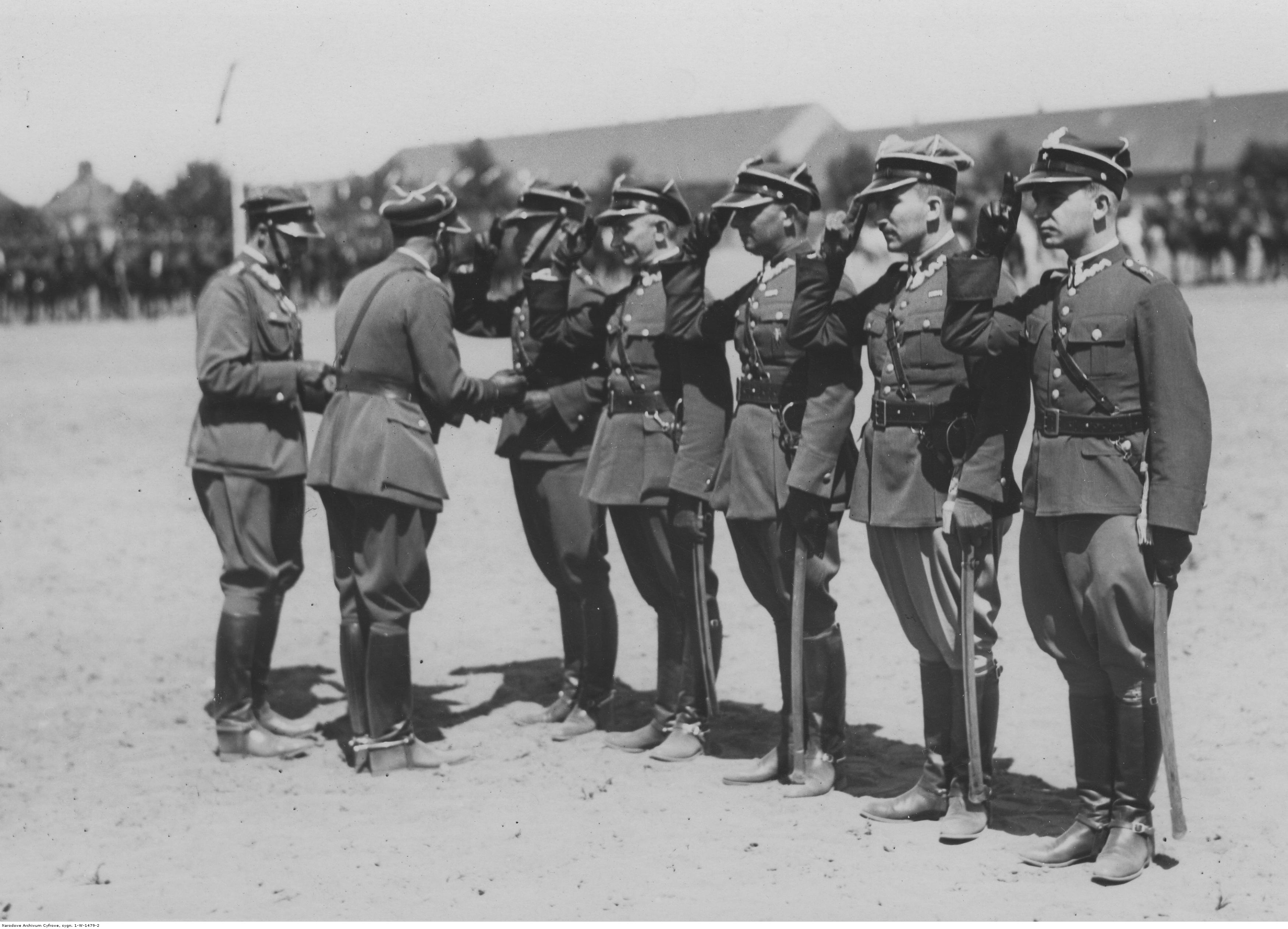 XV rocznica powstania 7 Dywizjonu Artylerii Konnej w Poznaniu. Dowódca pułku płk Mikołaj Łapicki (drugi z lewej) odznacza odznaką pułkową oficerów czynnych i rezerwowych 7 DAK-u. Koncern Ilustrowany Kurier Codzienny - Archiwum Ilustracji. Sygnatura: 1-W-1479-2